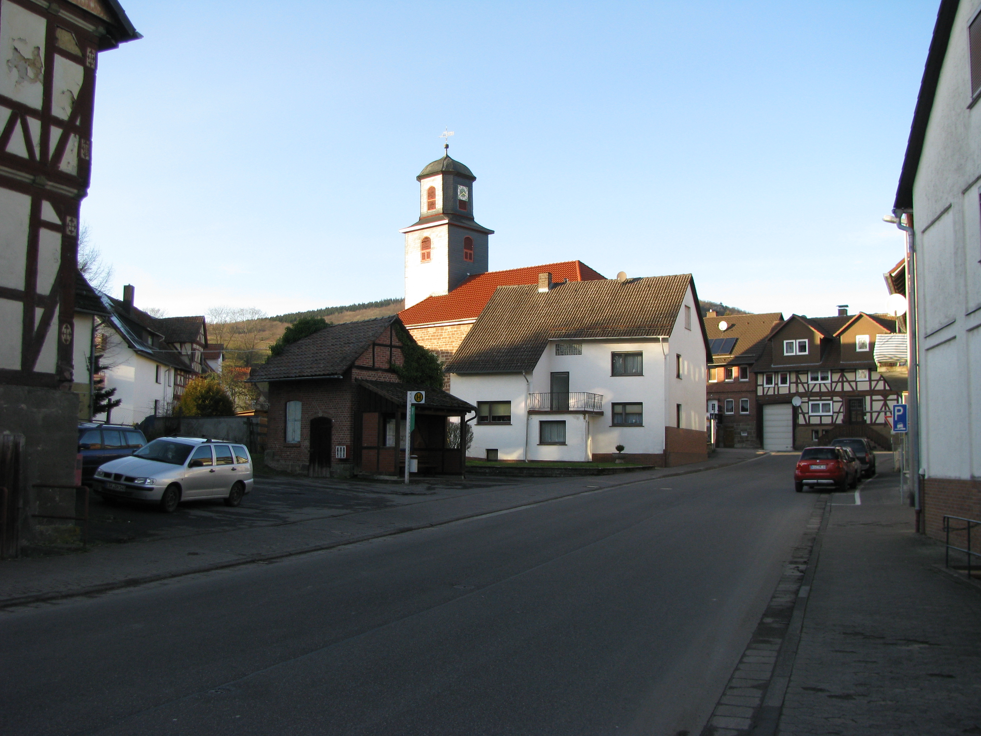 die Bushaltestelle Mitte in der Walburger Straße in Rommerode für die Fahrten in Richtung Hess. Lichtenau